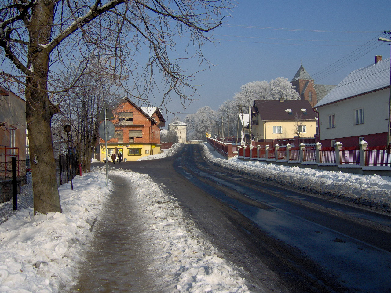 Kamień zimą. 15 stycznia 2006. own work: pimpek